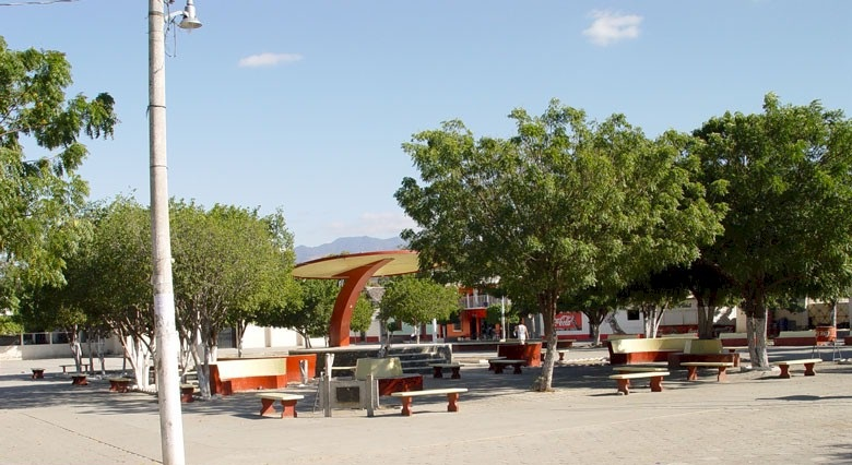 Parque de Cabañas en el año de 2004 antes de su remo delación.